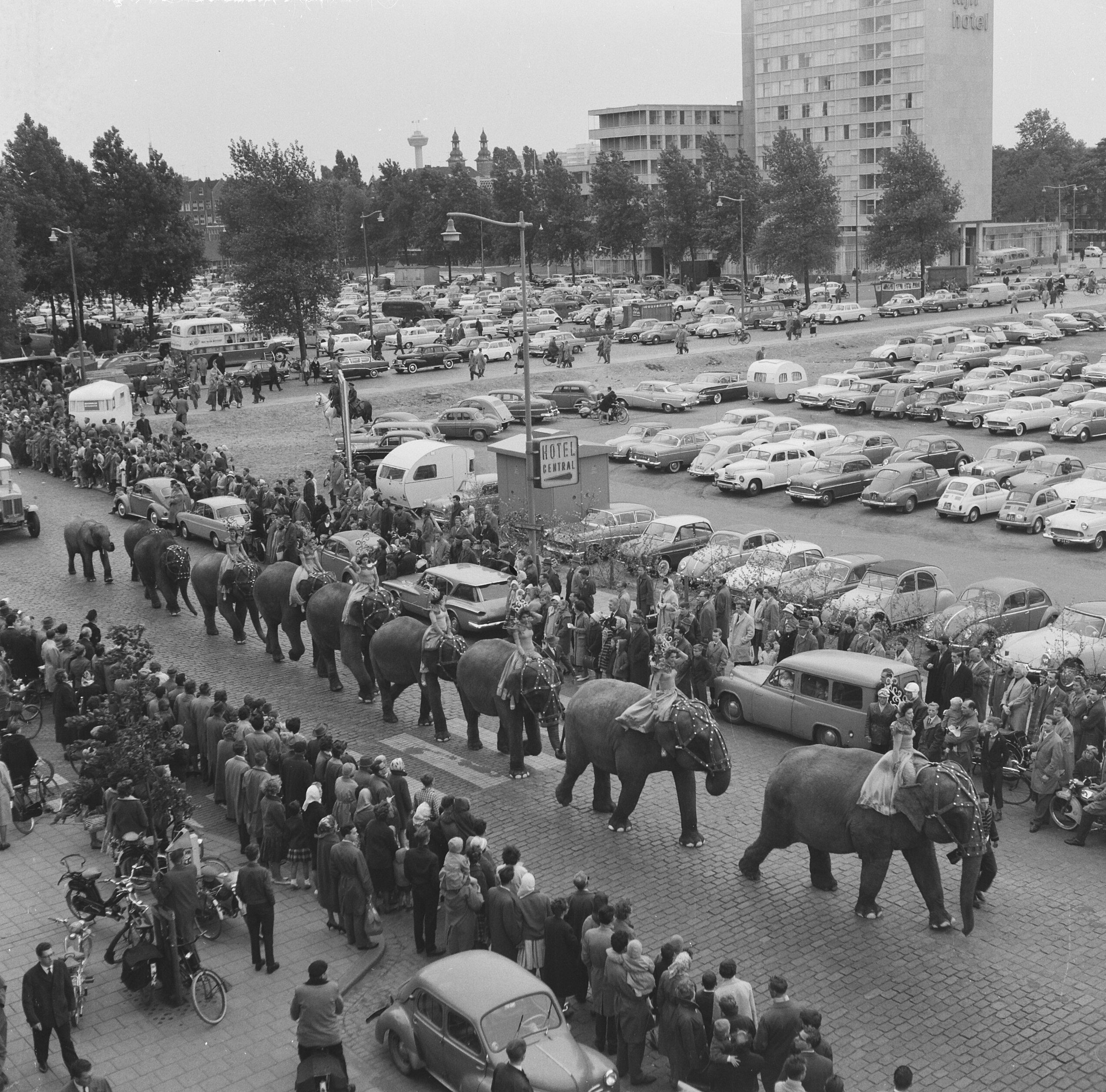 Collectie / Archief : Fotocollectie Anefo Reportage / Serie : [ onbekend ] Beschrijving : Optocht circus Williams door Rotterdam. Olifantenoptocht Datum : 3 juni 1961 Locatie : Rotterdam, Zuid-Holland Trefwoorden : optochten Persoonsnaam : WILLIAMS CIRCUS Fotograaf : Voets, Jan / Anefo Auteursrechthebbende : Nationaal Archief Materiaalsoort : Negatief (zwart/wit) Nummer archiefinventaris : bekijk toegang 2.24.01.03 Bestanddeelnummer : 912-5598